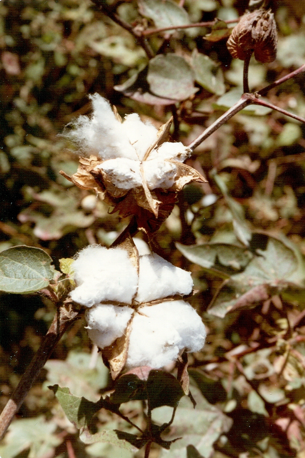 Gossypium herbaceum (Algodón) - Frutos maduros cuadri y penta-loculares abiertos con su algodón in situ - Cultivo, Albatera (Alicante, España).